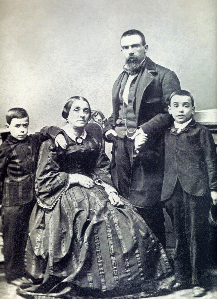 Juan Manuel Blanes, pintor uruguayo, junto a su familia.